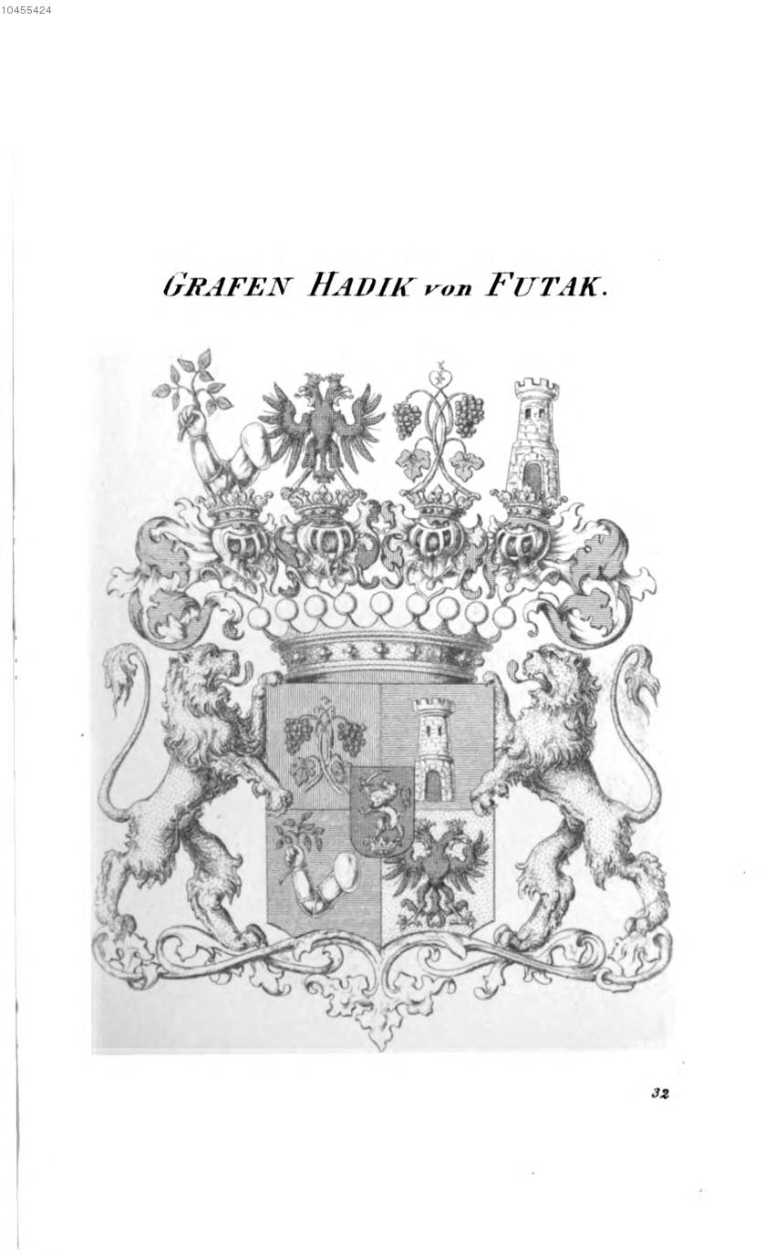 Wappen Hadik von Futak 2 - Tyroff AT.jpg